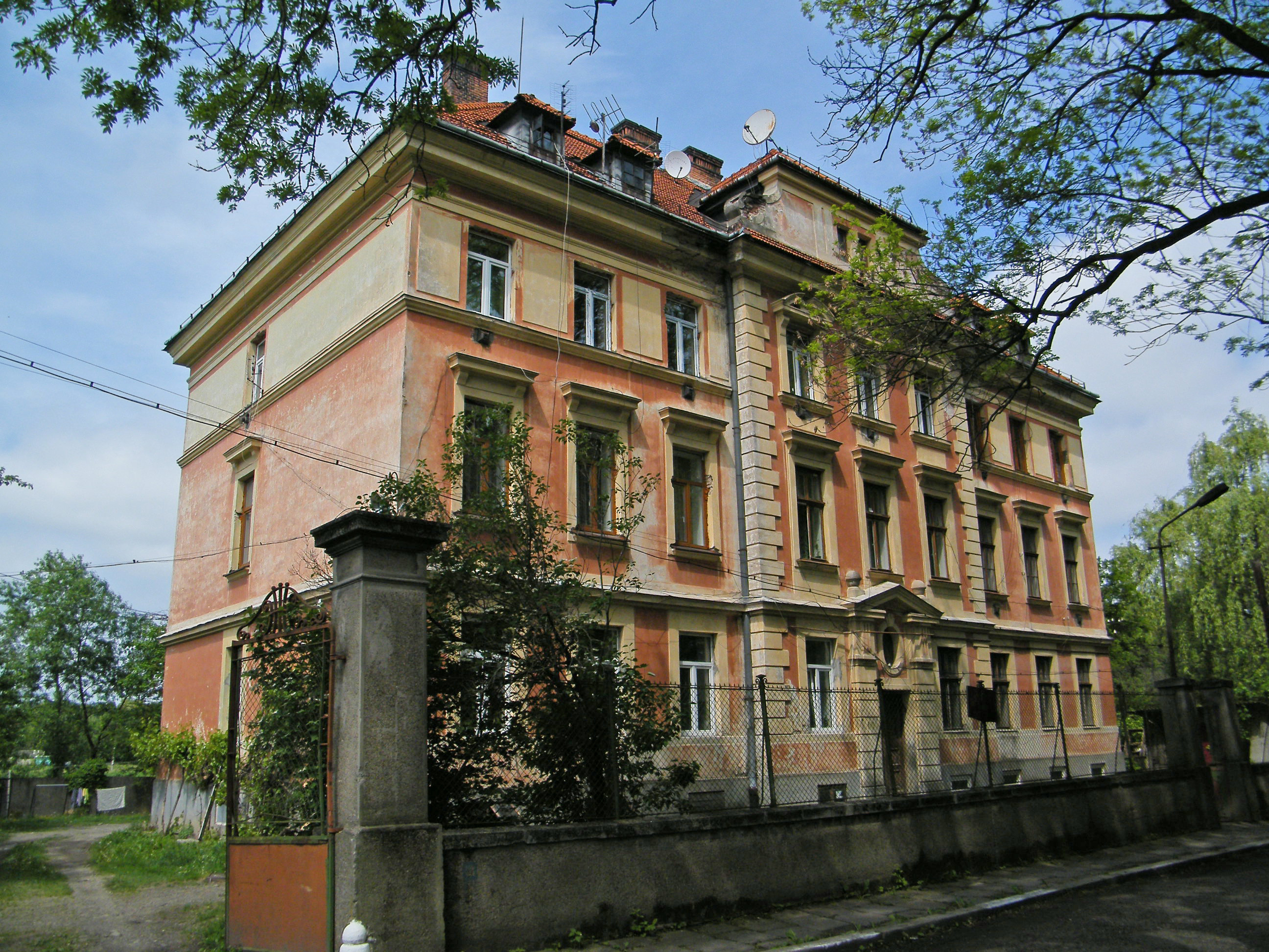 табачная фабрика